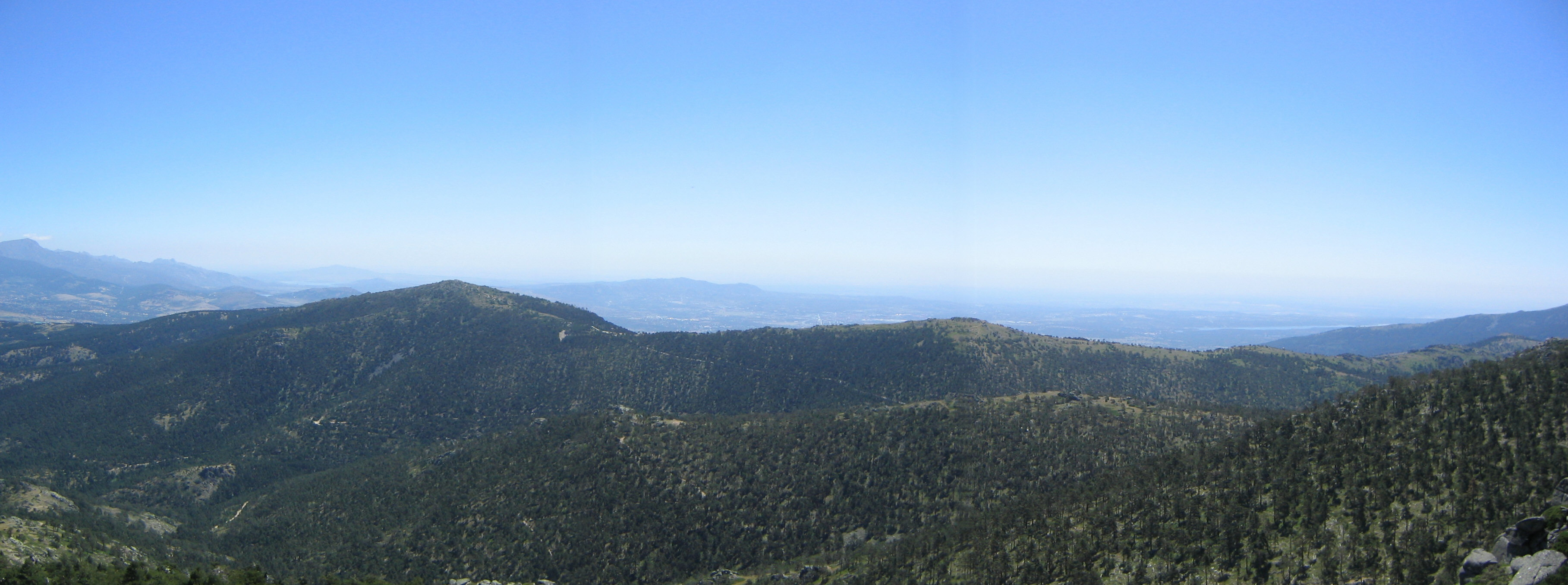 Cabeza Líjar. El Espinar, Segovia, España.